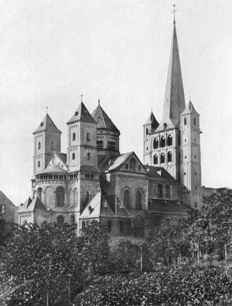 Abtei Brauweiler um 1925